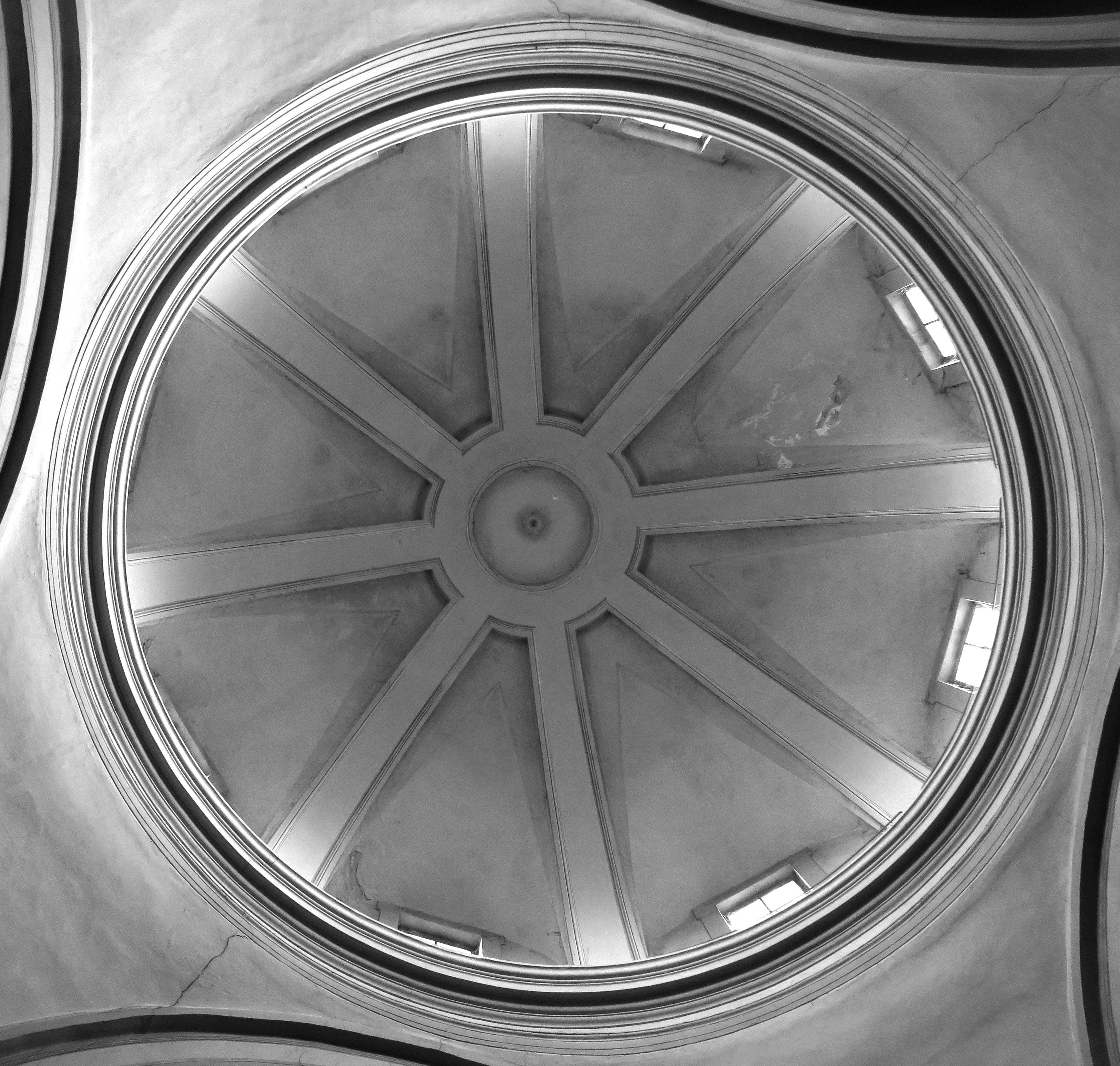 Cupola della Chiesa del Cristo (Codogno)